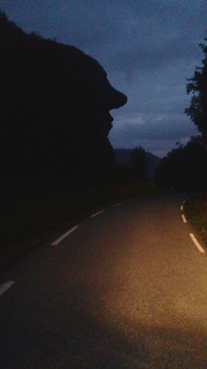 Ombo-gubben på øya Ombo i Ryfylke